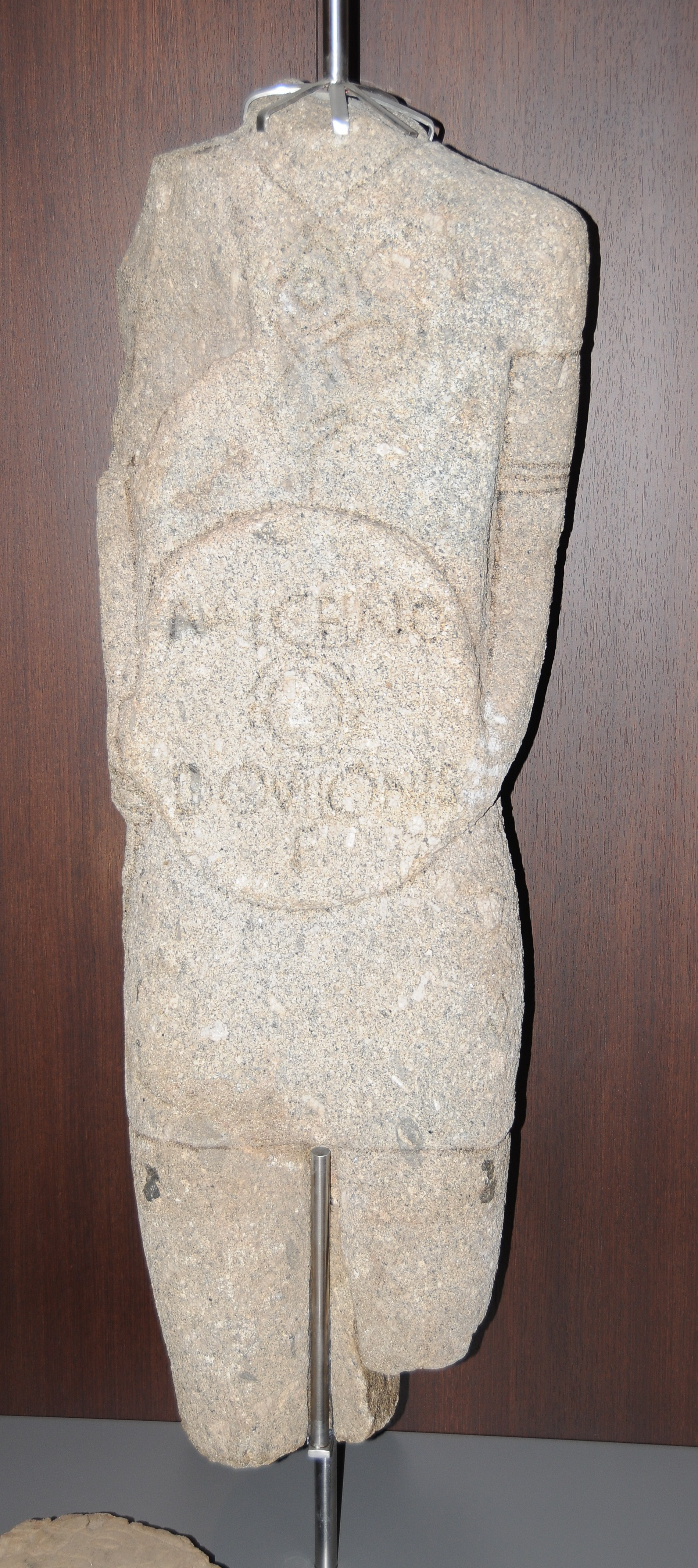 Statue in D. Diogo de Sousa Museum, Braga, Portugal